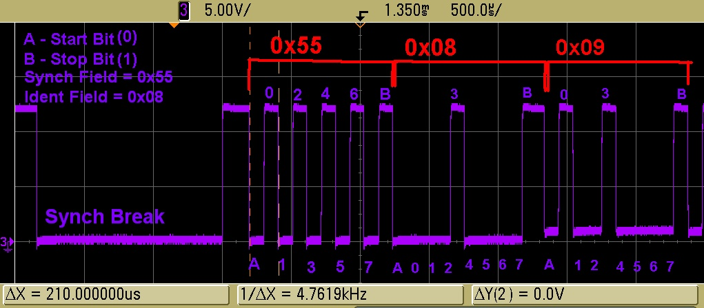 Pierwsze bajty ramki zgodnej ze standardem LIN